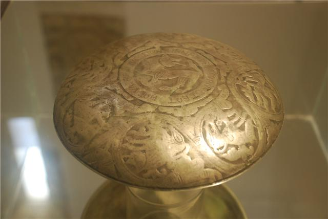 Patena mozárabe del Monasterio de Valcavado (siglo X), se exhibe en Museo de la Villa Romana de la Olmeda (Saldaña). La patena es de plata con baño de oro y la inscripción que rodea al León reza en latín: "+ IN NOMINE DOMINI OSORIVS ET GOTO HOC VAS FIERI IVSSERVNT" (En el nombre de Dios, Osorio y Goto mandaron hacer este vaso".